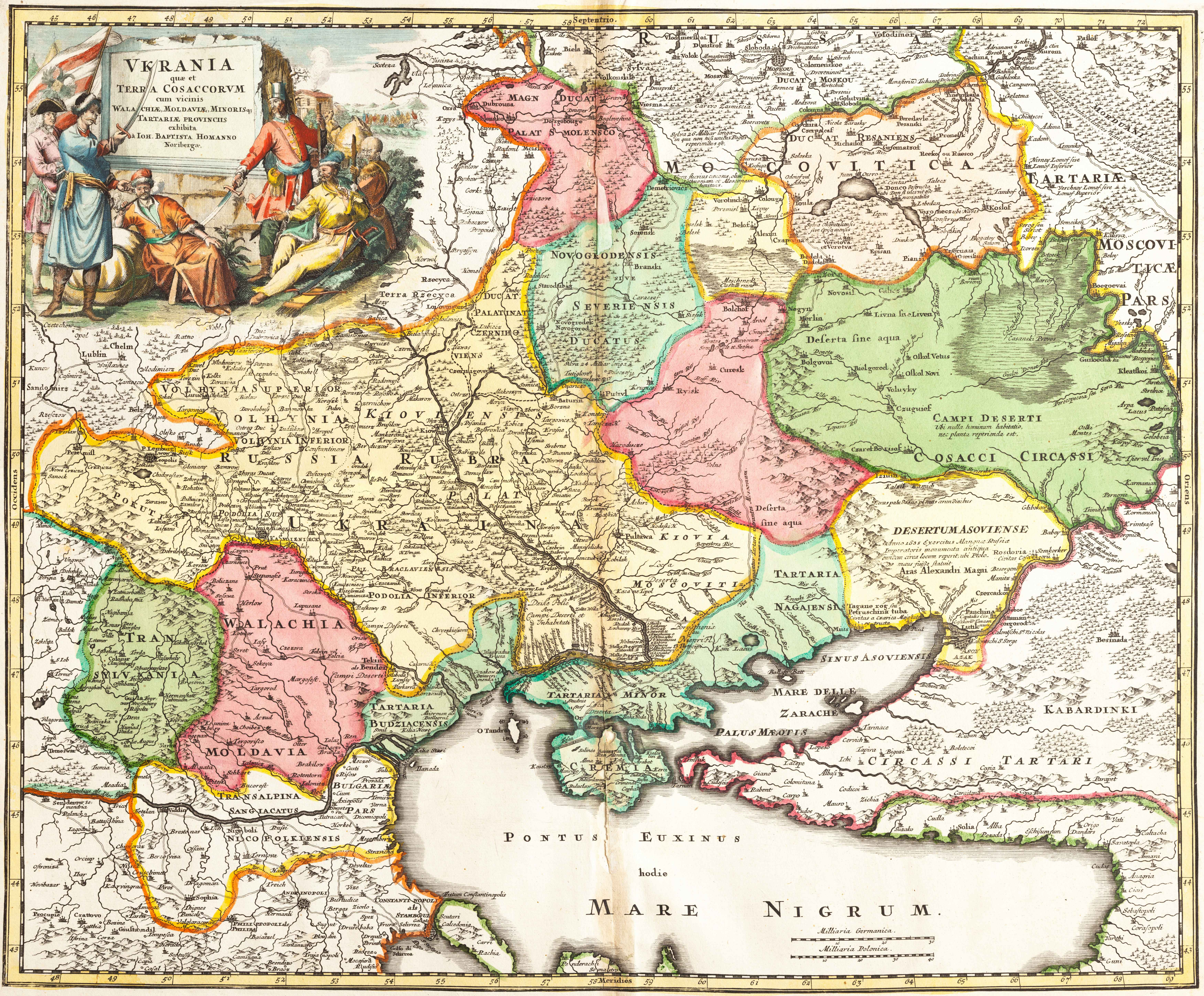 Ukrania quae et Terra Cosaccorum cum vicinis Walachiae, Moldoviae, Johann Baptiste Homann (Nuremberg, 1720) «Україна або козацька земля з прилеглими провінціями Валахії, Молдавії і Малої Татарії, зображена Йоганом-Баптистом Гоманном». Відома за скороченою назвою «Terra Cosaccorum». Йоган Баптист Гоманн акумулював усі відомі на початок 1700-х років досягнення науковців, географів, знання істориків і дані про поточну ситуацію в Україні, щоб зробити цю карту. На мапі позначене місце Полтавської битви 1709 року; землі Задунайської Січі, які у 1711 році були передані Туреччині, позначені у складі Кримського ханства; вказане будівництво Перекопського валу тощо. В картуші території названо на латинський манер Vkraina, а вже на самій карті позначено Ukraina.